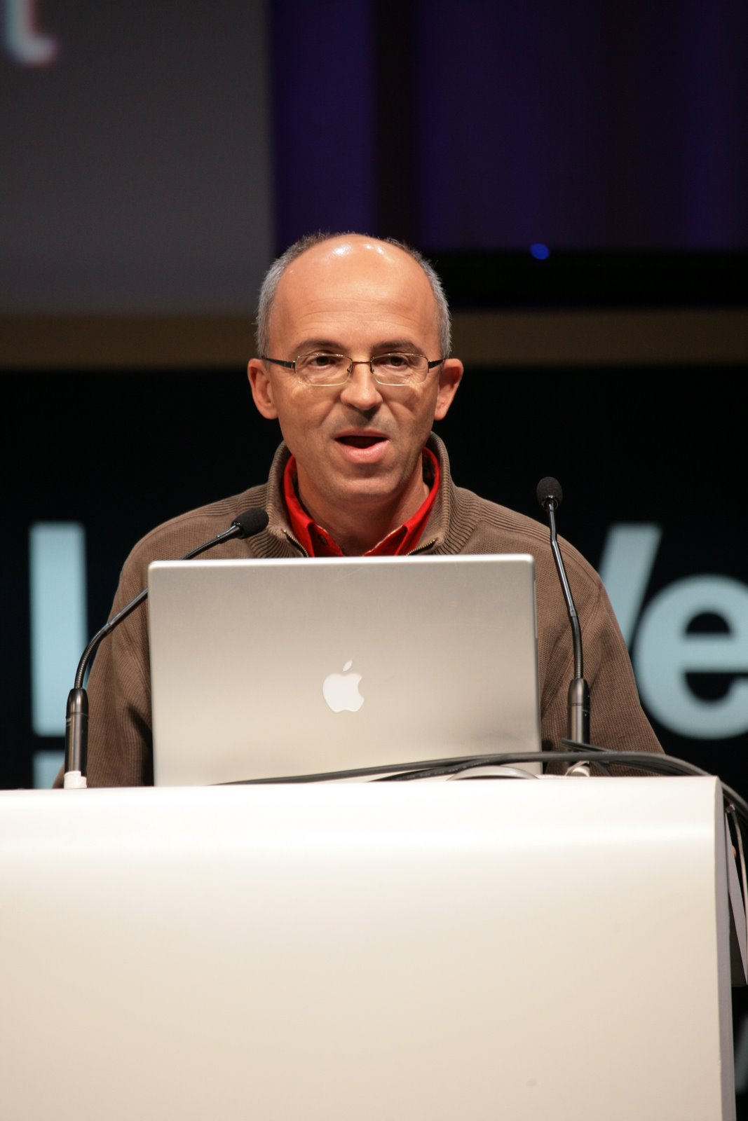 Pierre Chappaz lors de la conférence LeWeb 2008